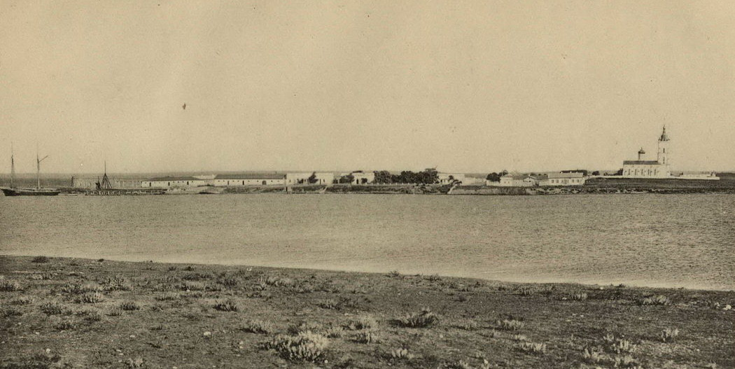 Общий вид селения Ак-Мечеть с западного берега бухты, 1911 "Труды отдела торговых портов", выпуск XXVIII. С.-Пб., 1911